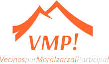 Logo VMP con texto